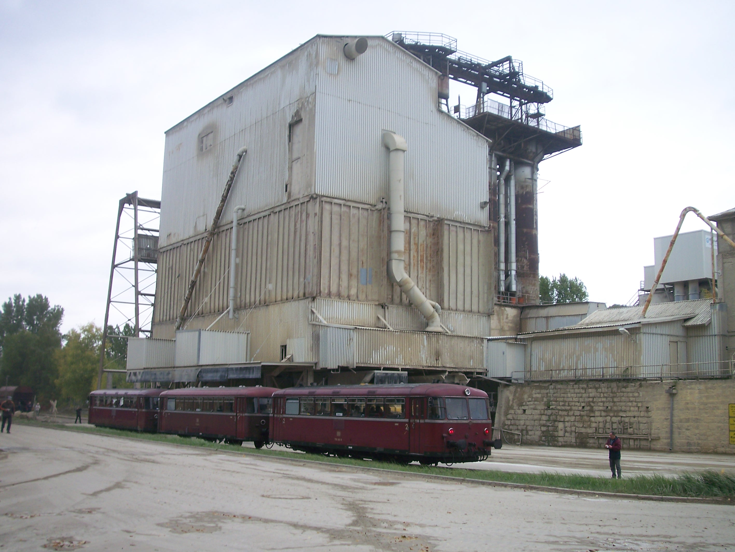 Schienbus bei einer Sonderfahrt im Kalkwerk Salzhemmendorf, Kleinbahn Voldagsen-Duingen-Delligsen